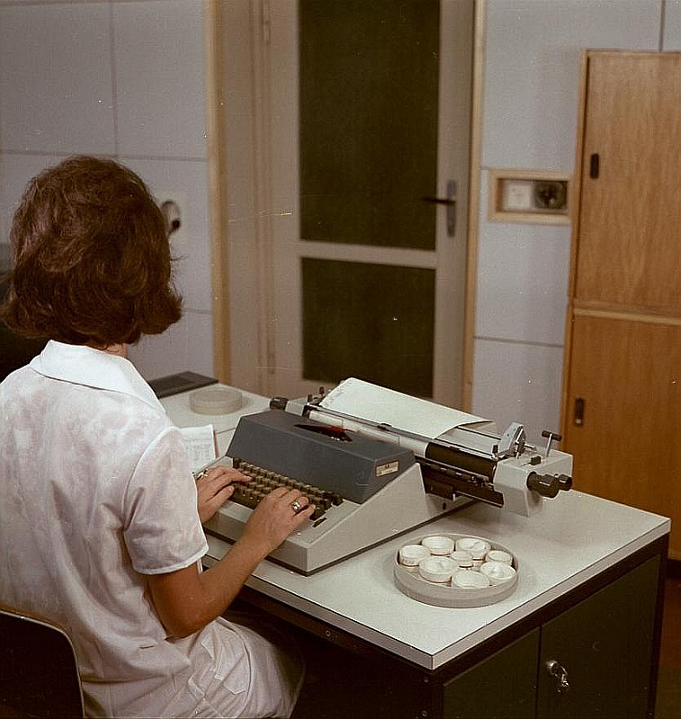 Original image description from the Deutsche Fotothek Facharbeiter für SchreibtechnikVEB Kombinat ILKA Luft- und Kältetechnik Dresden. Facharbeiterin für Schreibtechnik an der Konsole einer Lochbandstation